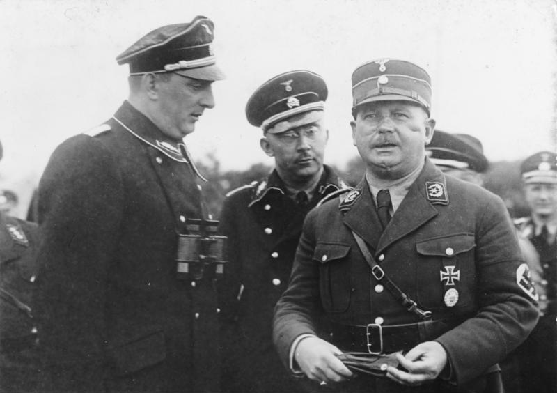 Der große SS-Schutz-Staffel-Appell der Gruppe Ost der SS. in Berlin! Der Stabschef Hauptmann [Ernst] Röhm, (rechts) der Reichsführer der SS. [Heinrich] Himmler, (mitte) und der Gruppenführer der Gruppe Ost der SS. [Kurt] Daluege, (links) beim Gespräch im Lager in Döberitz. August 1933 (Ausschnitt)